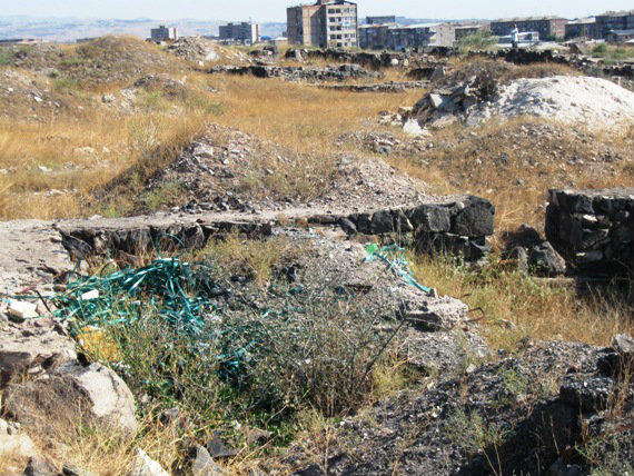 Թեյշեբանի, Կարմիր բլուր